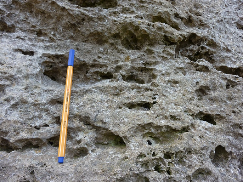 Nahansicht des Wäldlesfels mit diversen Bohrmuschellöcher. Der Wäldlesfels bei Steinheim am Albuch ist unter der Bezeichnung Sprudelkalkfelsen auf dem Steinhirt als Naturdenkmal ausgewiesen.